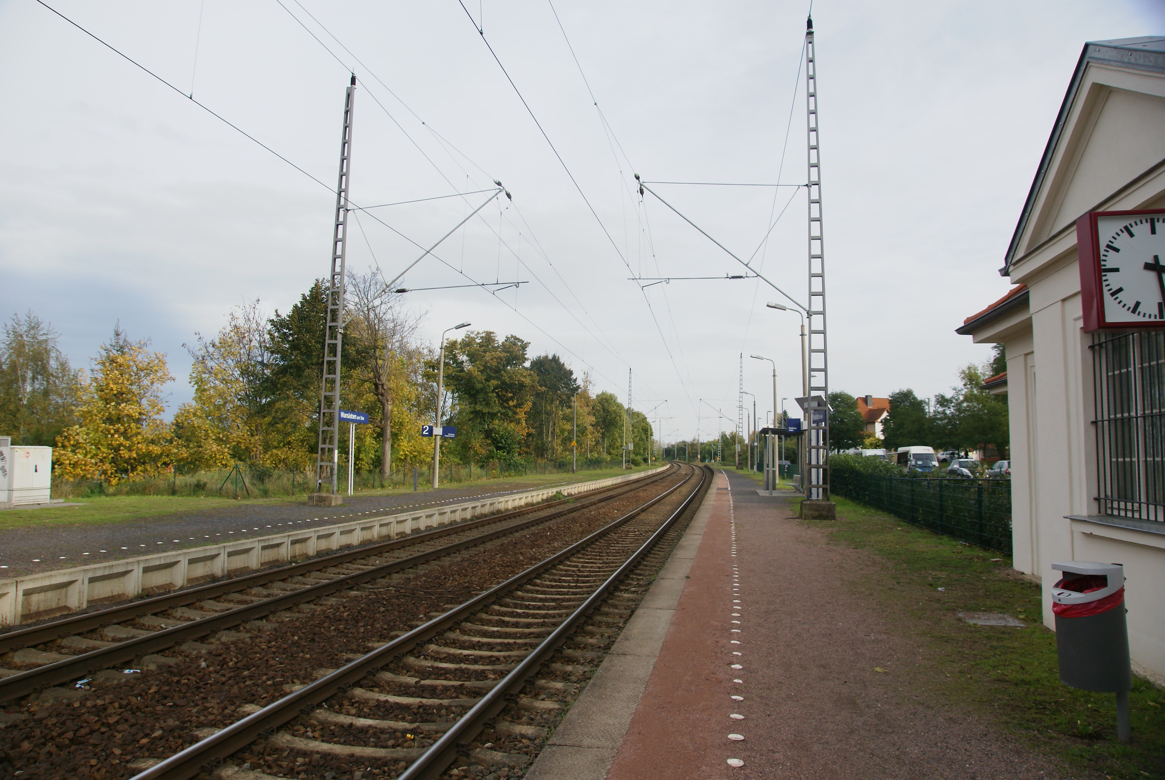 Der Bahnhof in Wansleben am See im Lanskreis Mansfeld-Südharz